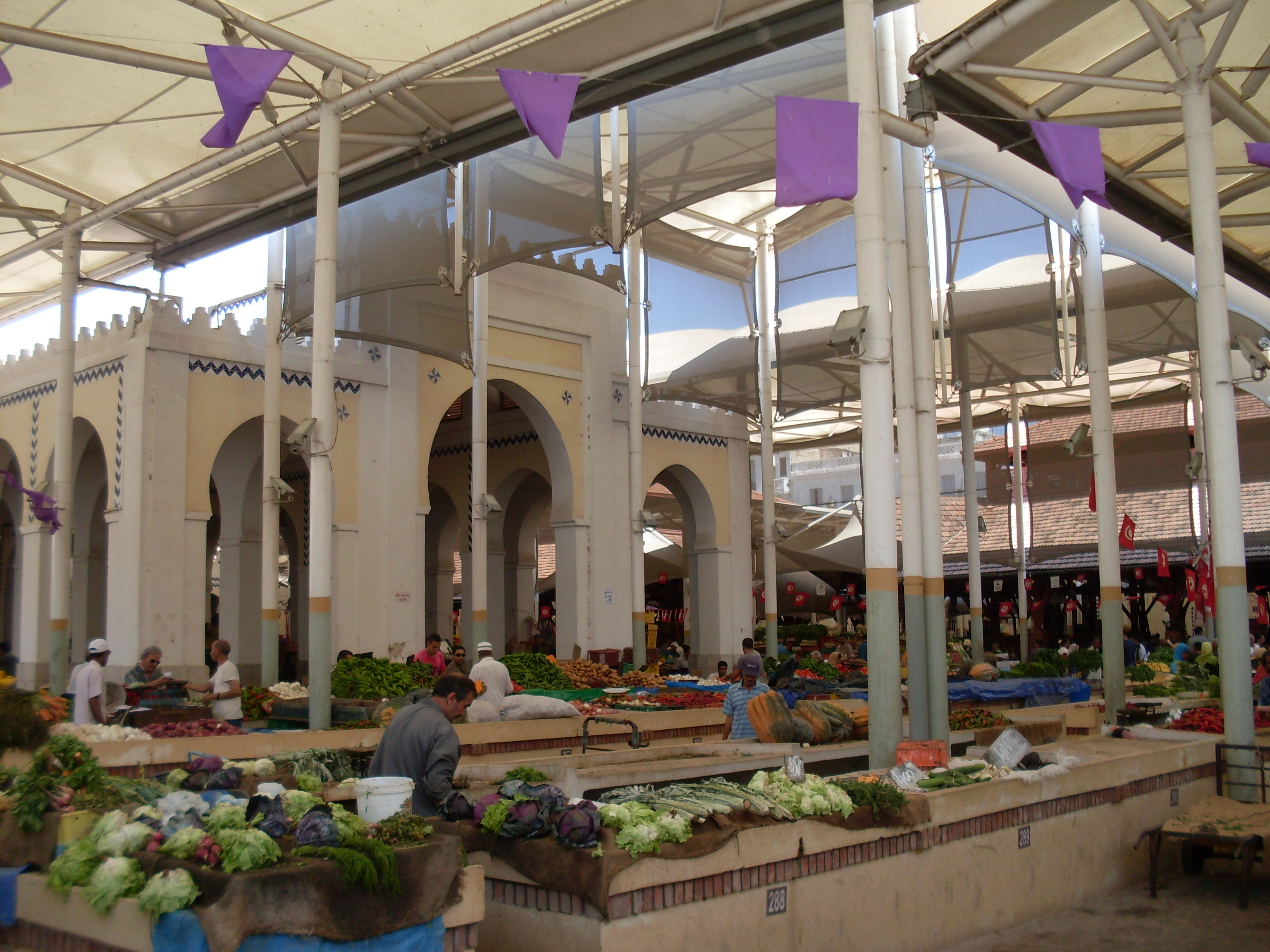 Marché central de la ville de Tunis, section fruits et légumes